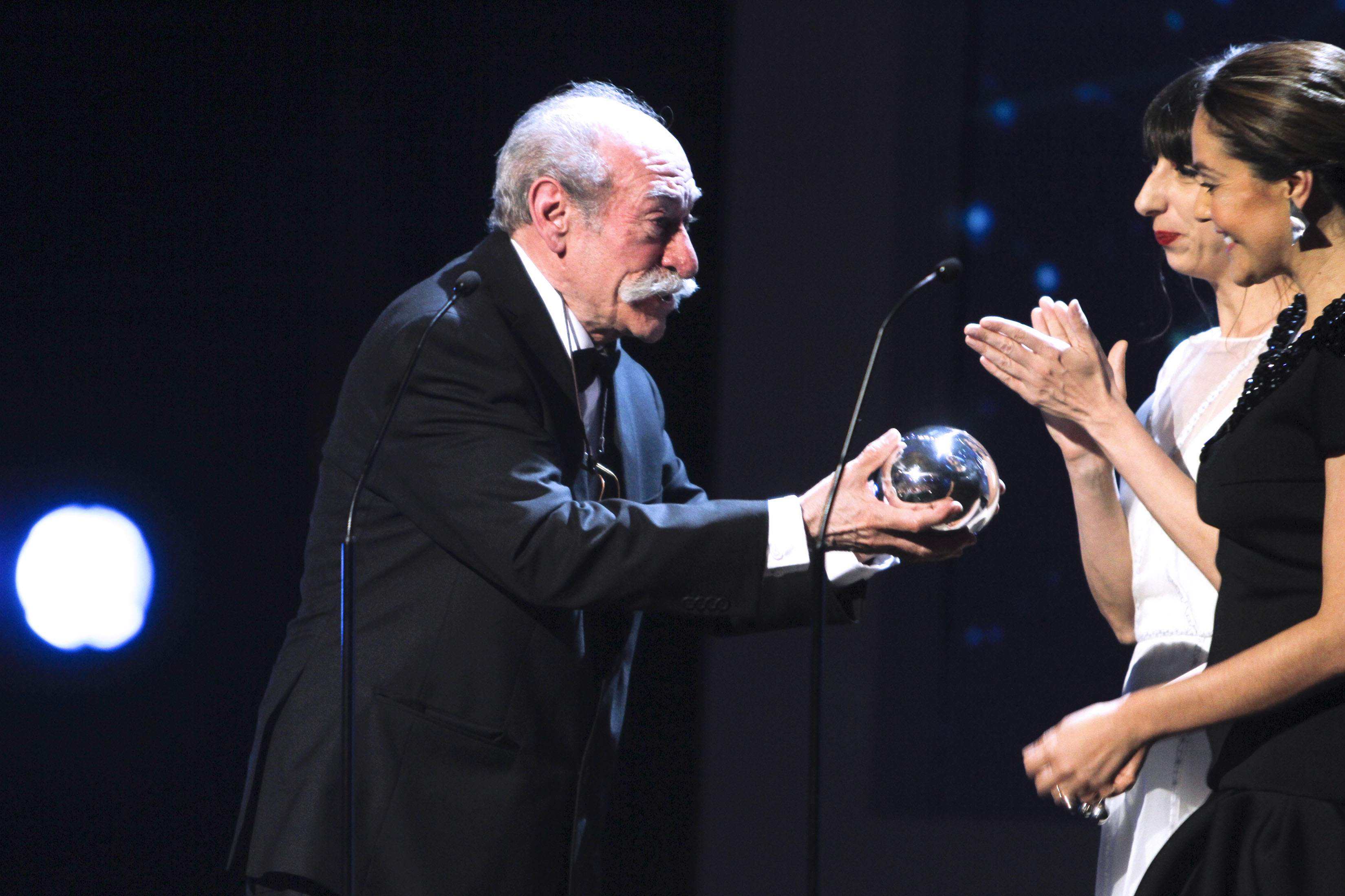 Miércoles 25 de noviembre de 2015. Se realizó la segunda entrega de los Fénix, Premio Iberoamericano de Cine, en el Teatro de la Ciudad Esperanza Iris. El Premio al trabajo crítico fue entregado al mexicano Jorge Ayala Blanco. Fotografía: Milton Martínez / Secretaría de Cultura CDMX.